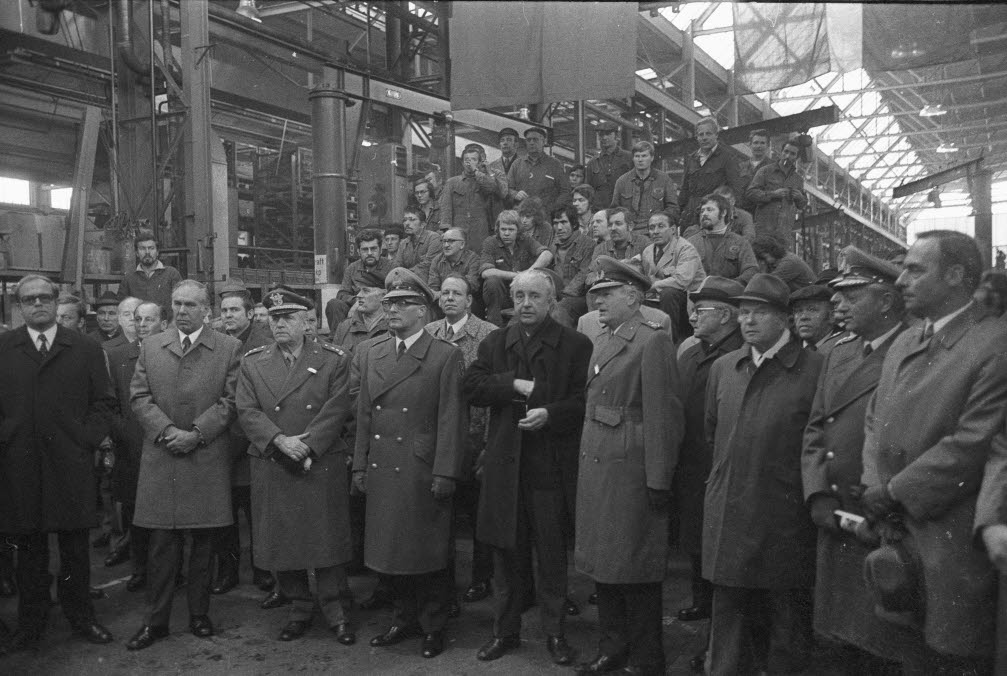 im Beisein des stellvertretenden Inspekteur des Heeres, Generalleutnant Siegfried Schulz (vordere Reihe, 4.v.r.). In der Bildmitte der Hauptgeschäftsführer der Industrie- und Handelskammer Kiel (IHK) Hendrik Genth (vordere Reihe, 5.v.r.).